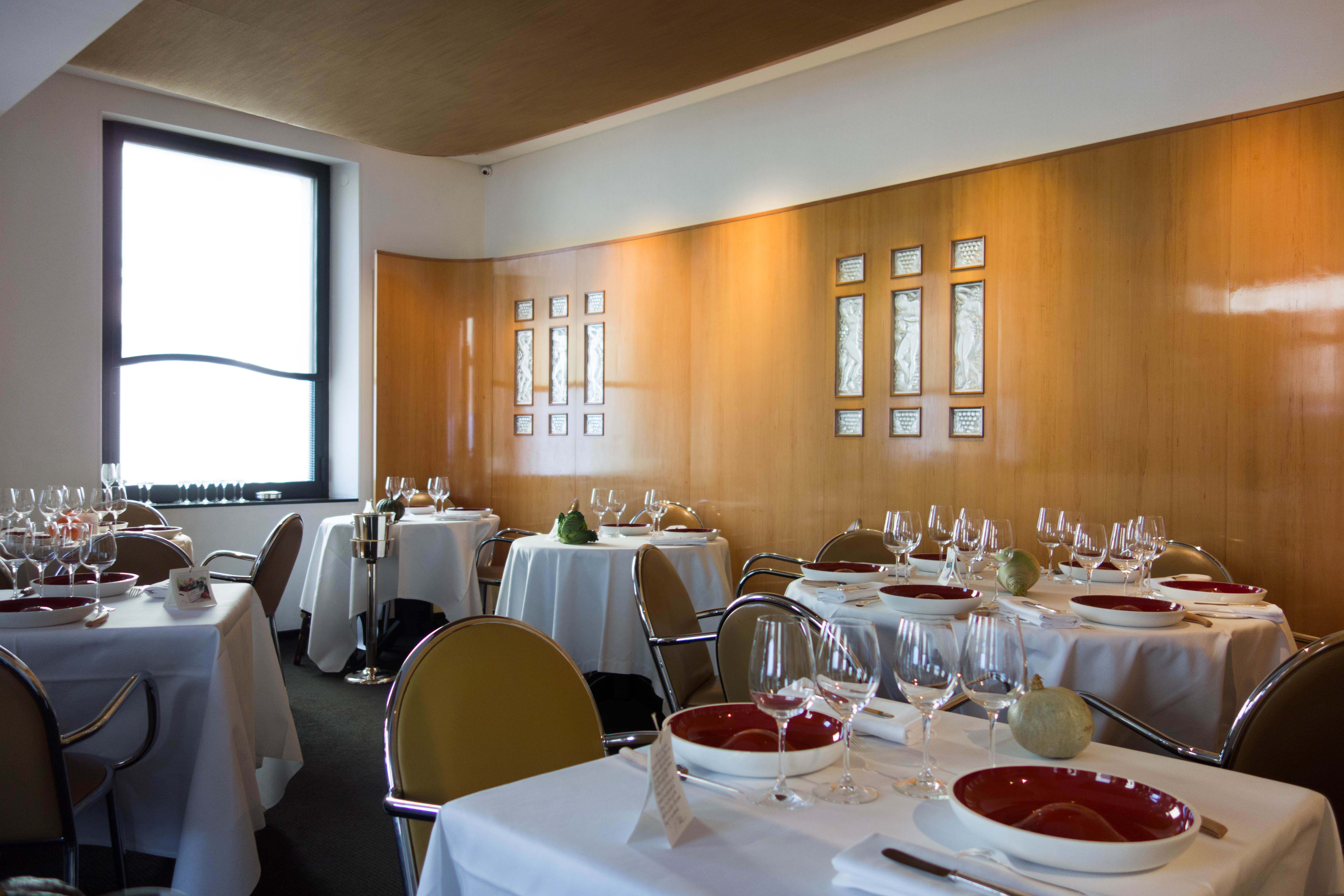 L'Arpege